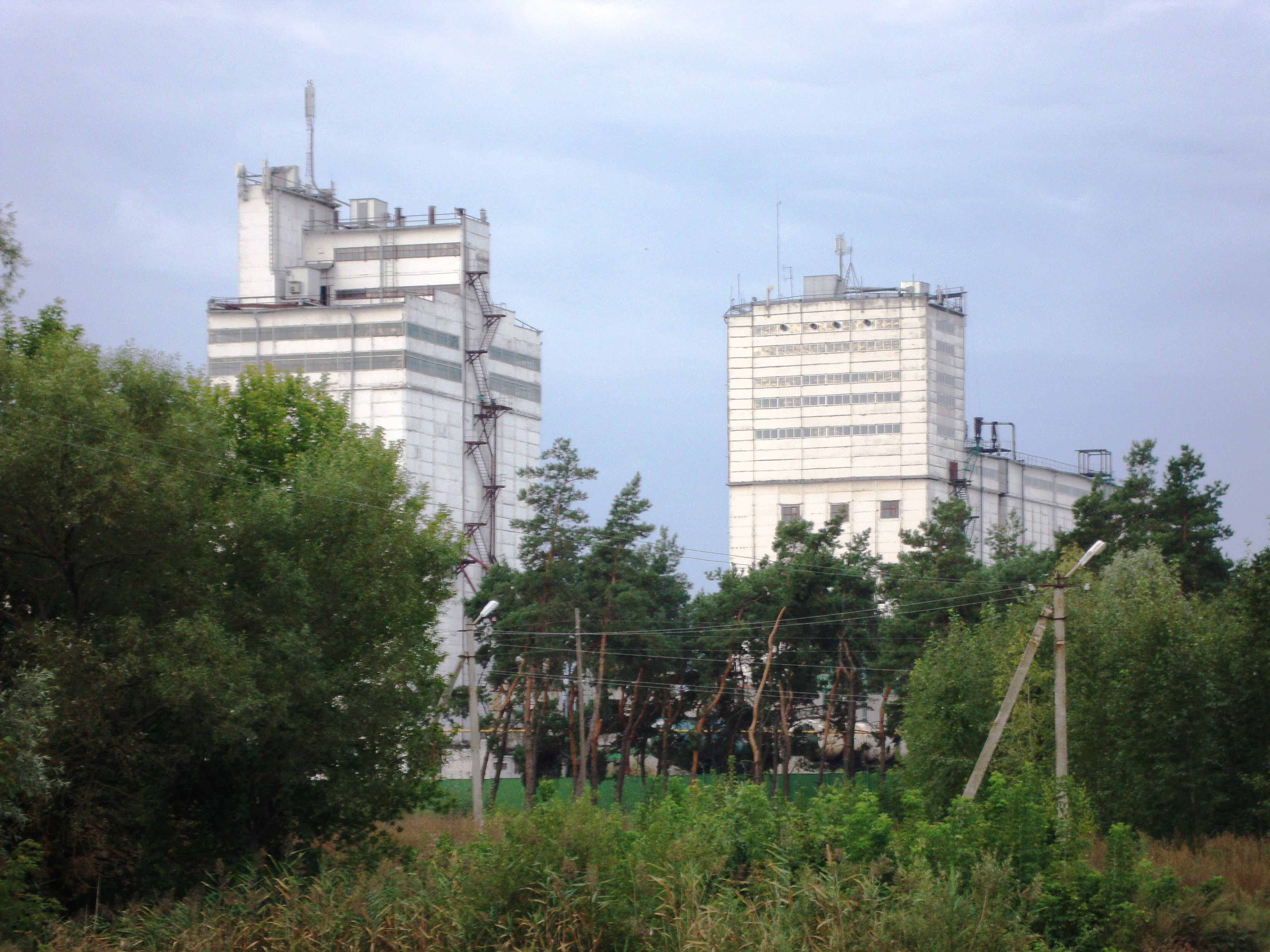 Вовчанский олійноекстраційний завод